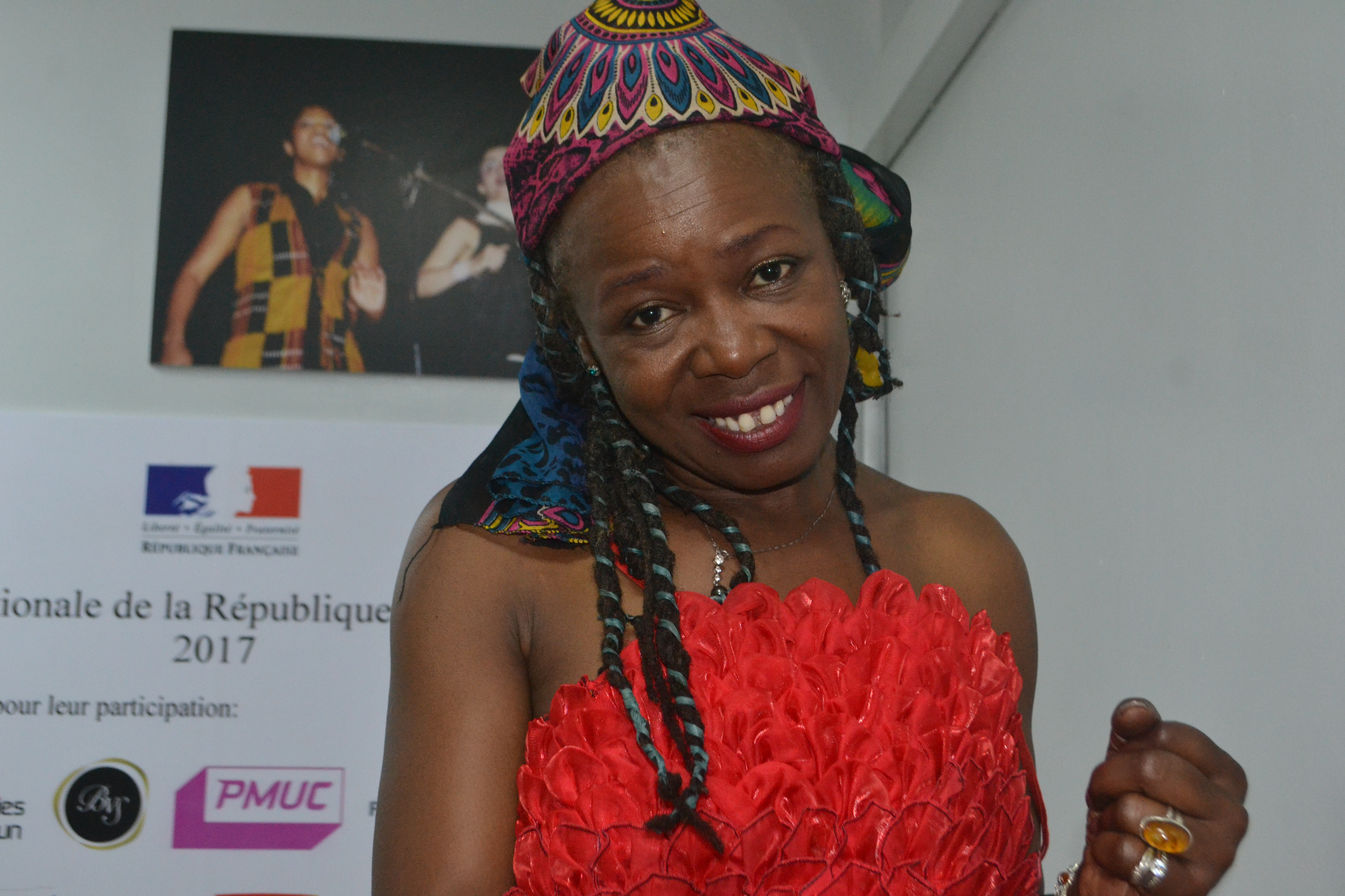 La chanteuse Camerounaise Sally Nyolo en Janvier 2018